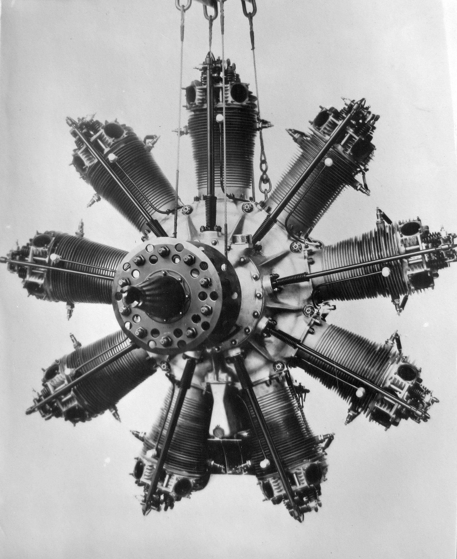 Walter Jupiter VI (1929-32)